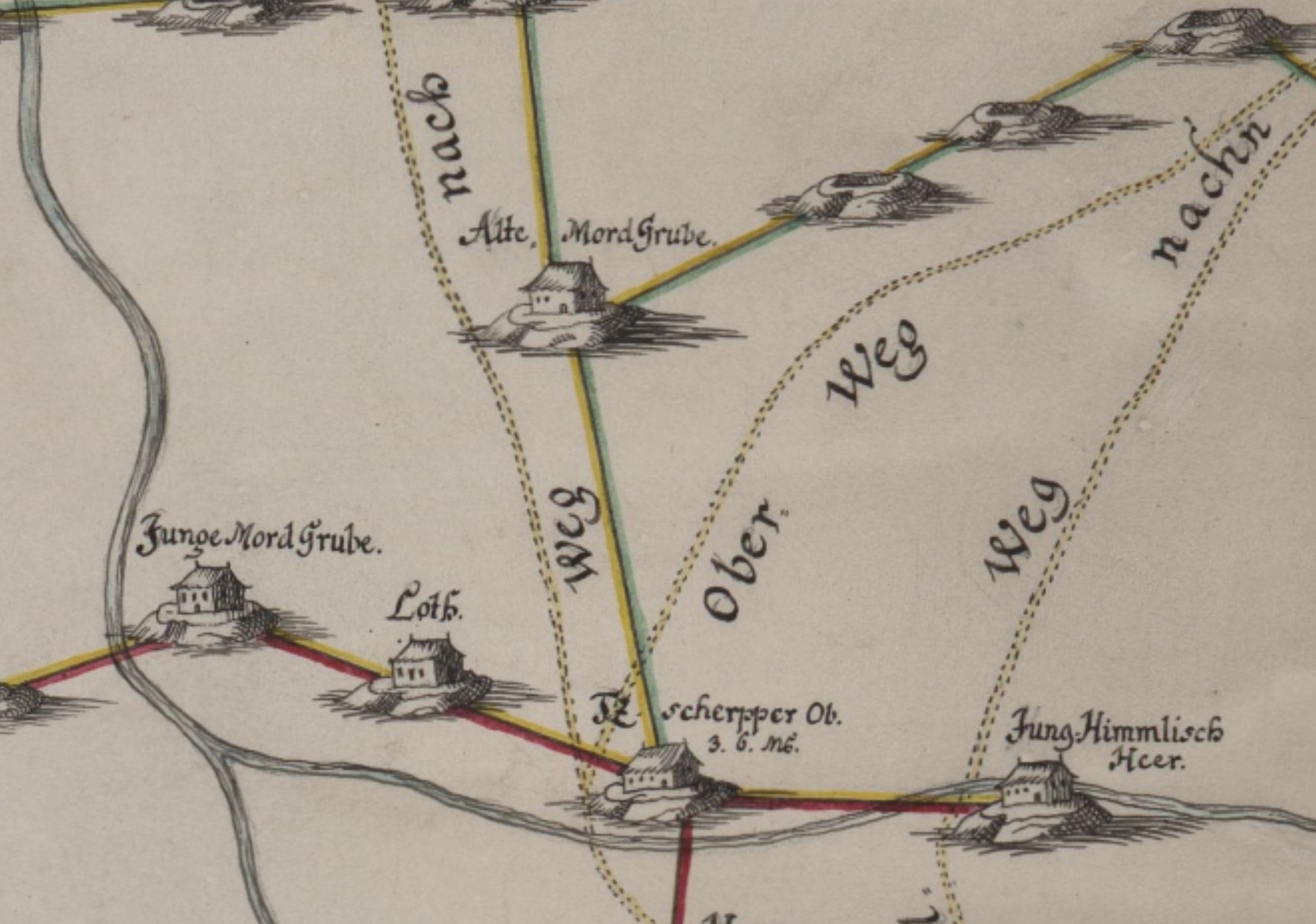 Ausschnitt mit Alter und Junger Mordgrube bei Freiberg. Aus: Bergbau bei Freiberg, Federzeichnung, 1745, Bergbav bey Freyberg. - [Ca. 1:25 000]. - Dresdae, 1745. - 1 Kt. : kolor. Federzeichng., Gesamtgr. 159 x 64 cm Mit Wappen, 1 Plan und 1 Ansicht. - Süden oben, 1745